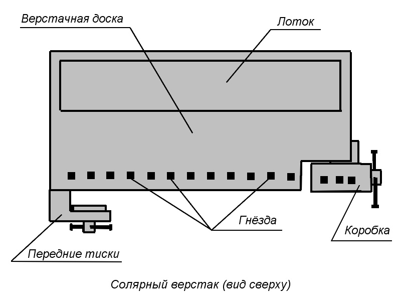 Схема устройства столярного верстака.